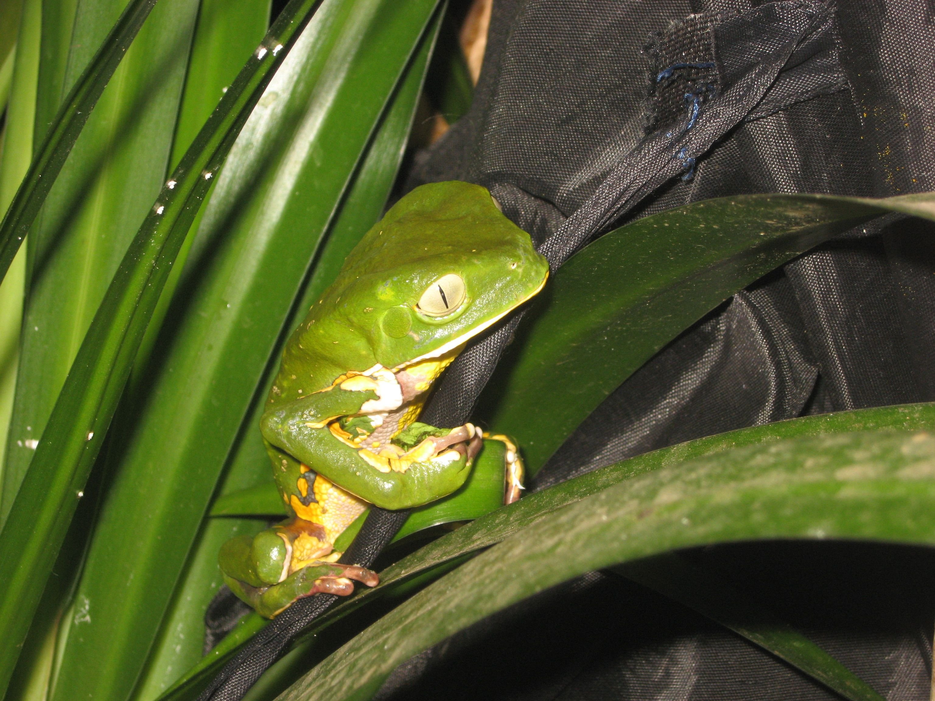 Rã arborícola; fauna da caatinga. Caetité, Bahia, Brazil.